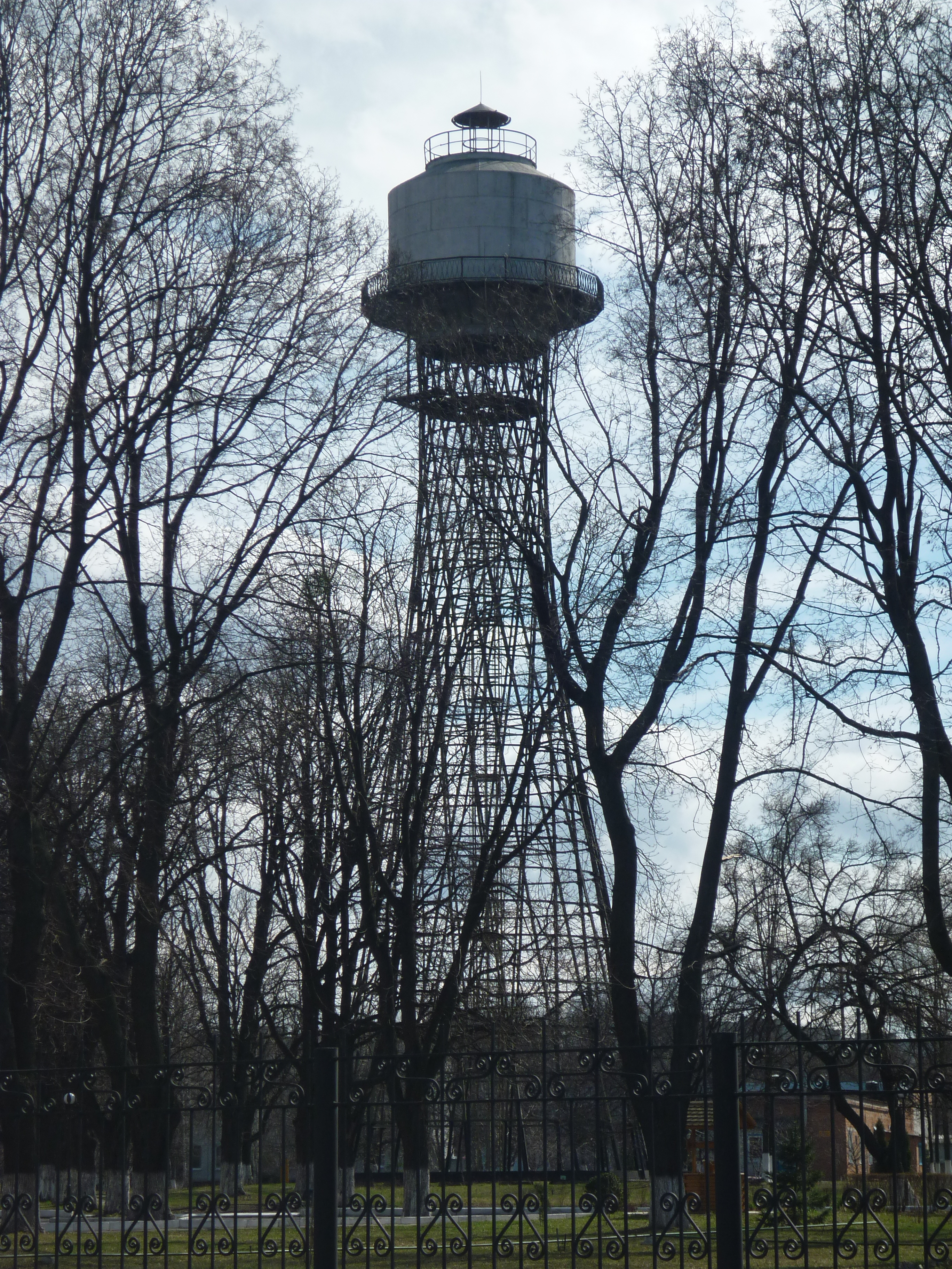 Гіперболоїдна башта на території Черкаського водоканалу